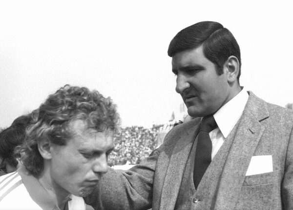 Fotbaliștii Ilie Balaci (stg.) și Necula Răducanu (dr.)